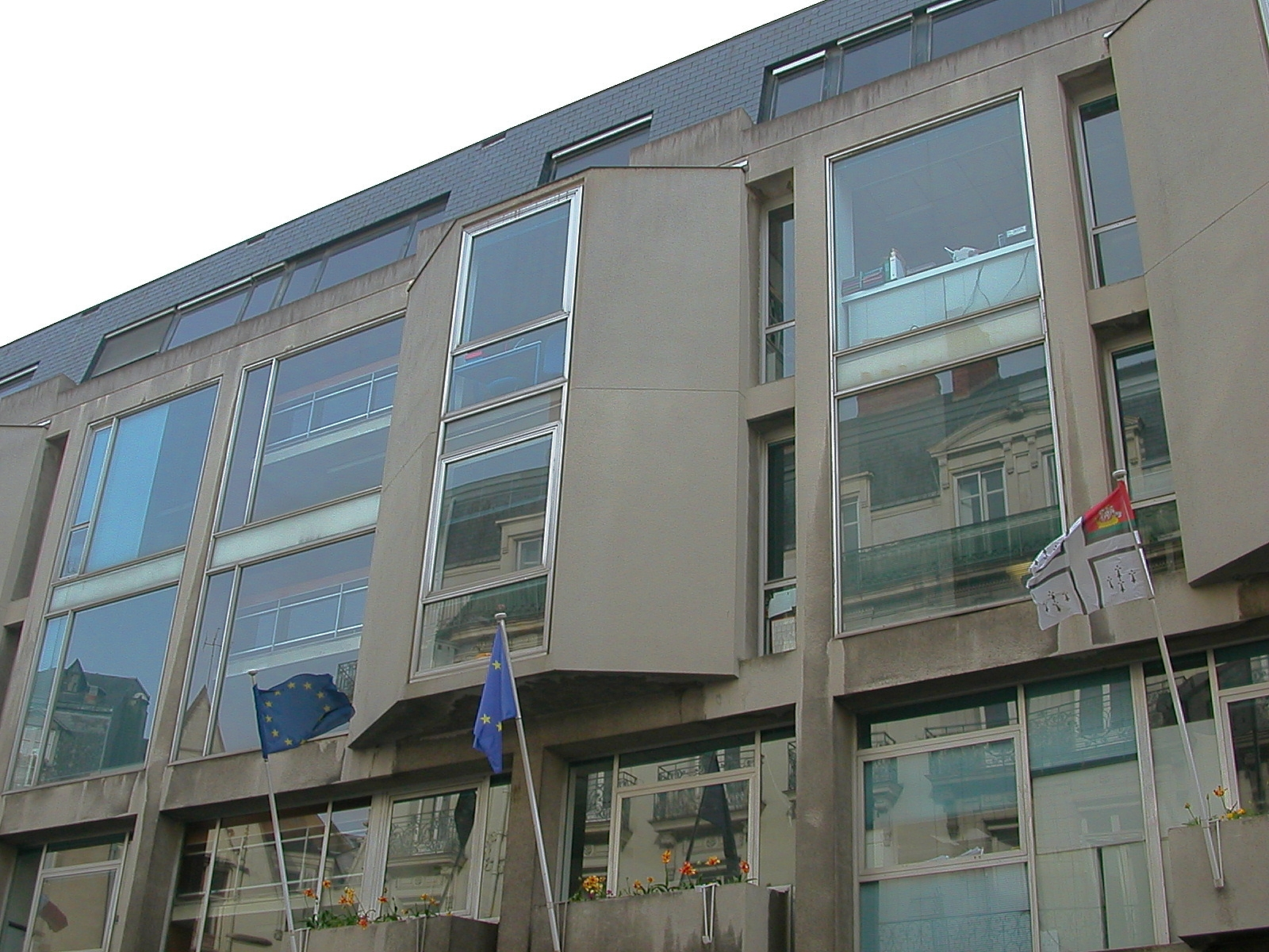 Façade de l'hôtel de ville de Nantes sur la rue de Strasbourg